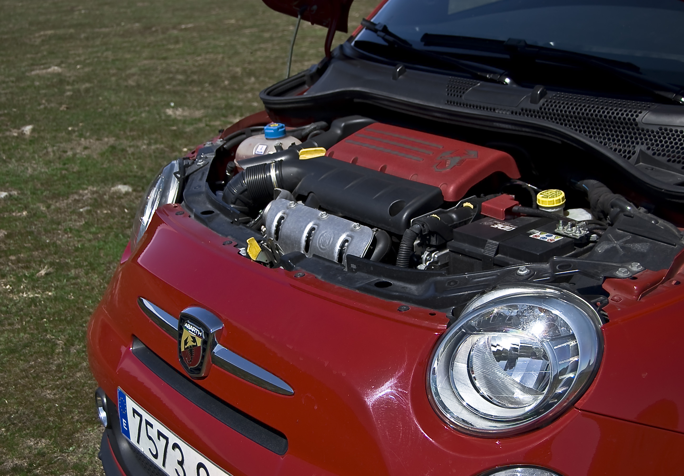 Prueba del Abarth 500 y photoshoot para Diariomotor